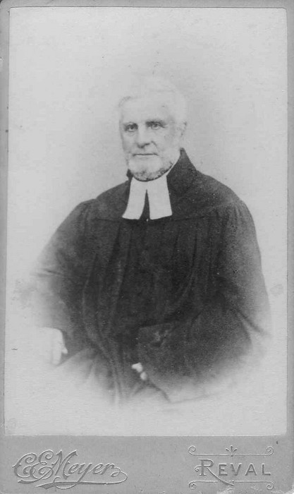 Porträt des Pastors Alexander von Sengbusch.